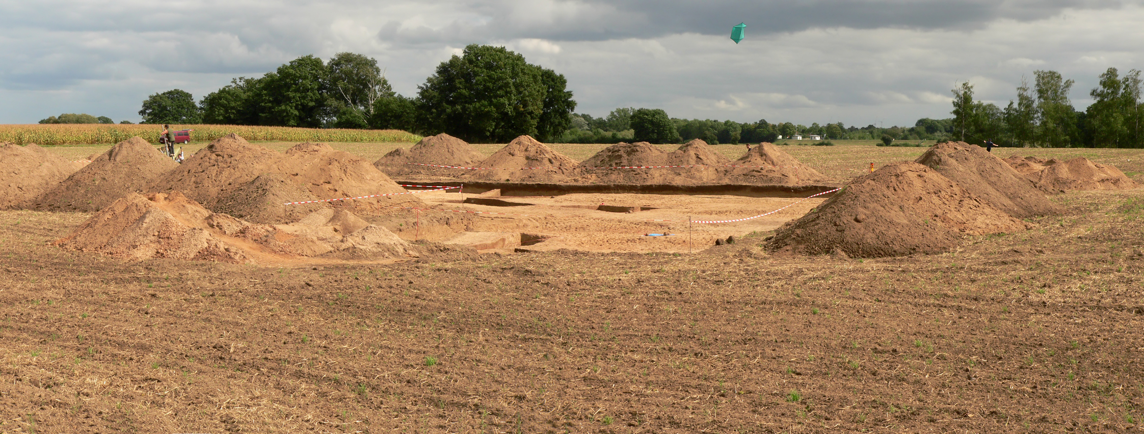 Ausgrabungsarbeiten am Erdwerk von Müsleringen, von der B 215 gesehen